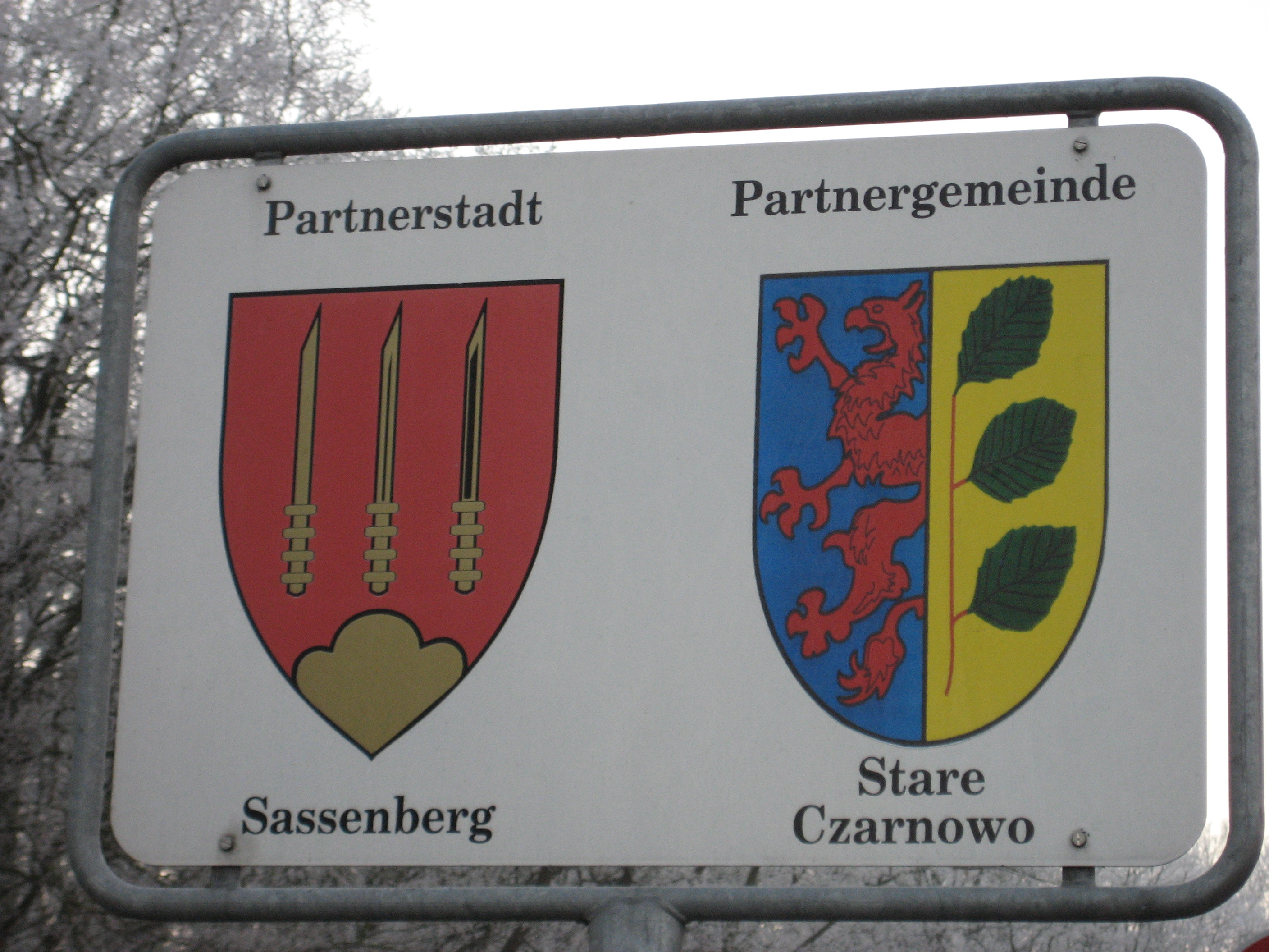 Schild mit den Namen und Wappen der Partnergemeinden von Löcknitz am Ortseingang aus Richtung Linken/dt.-poln. Grenze (23. Dezember 2007).